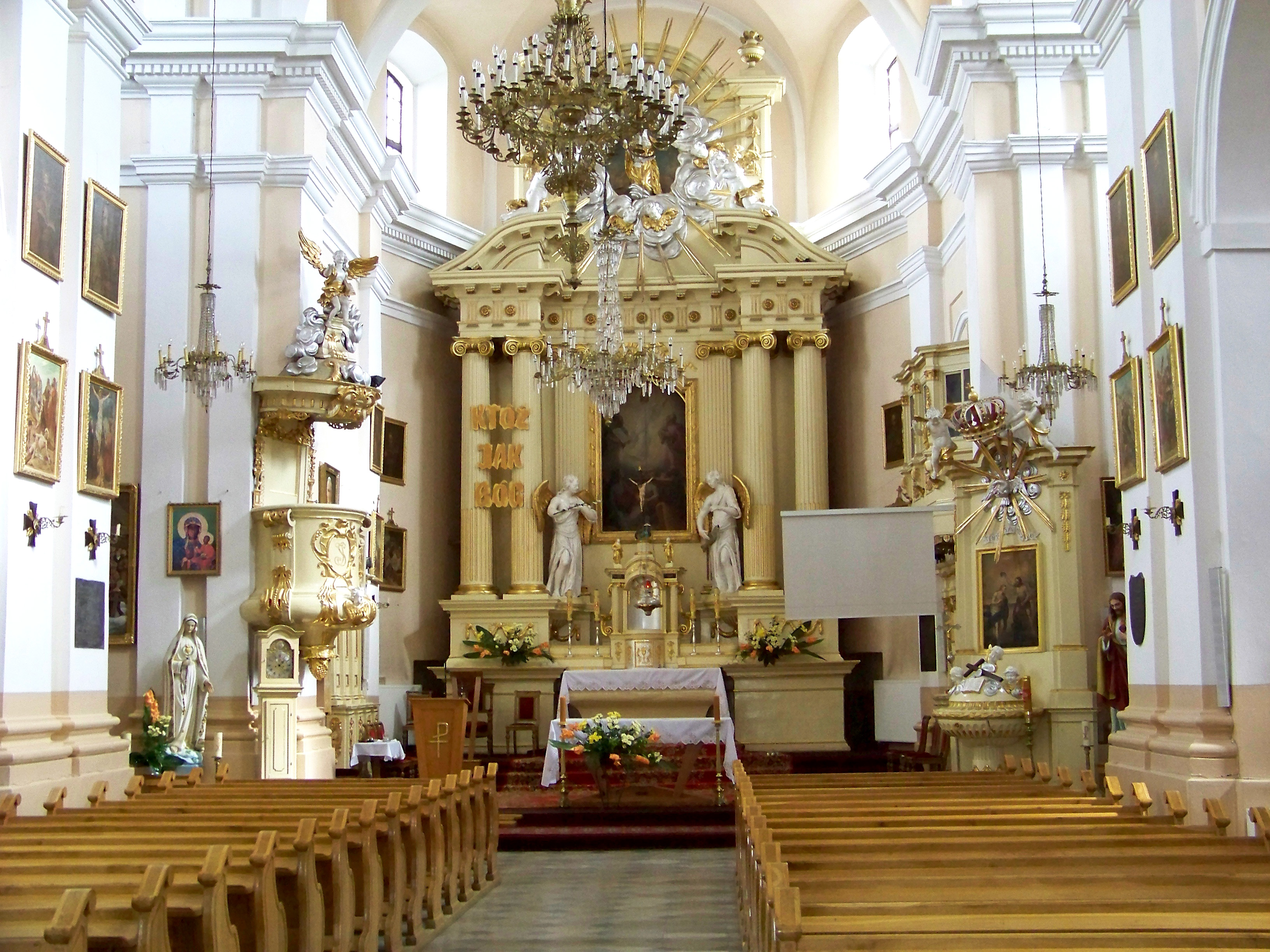 Mordy - ołtarz w kościele p.w. św. Michała Archanioła w Mordach z 1738r.